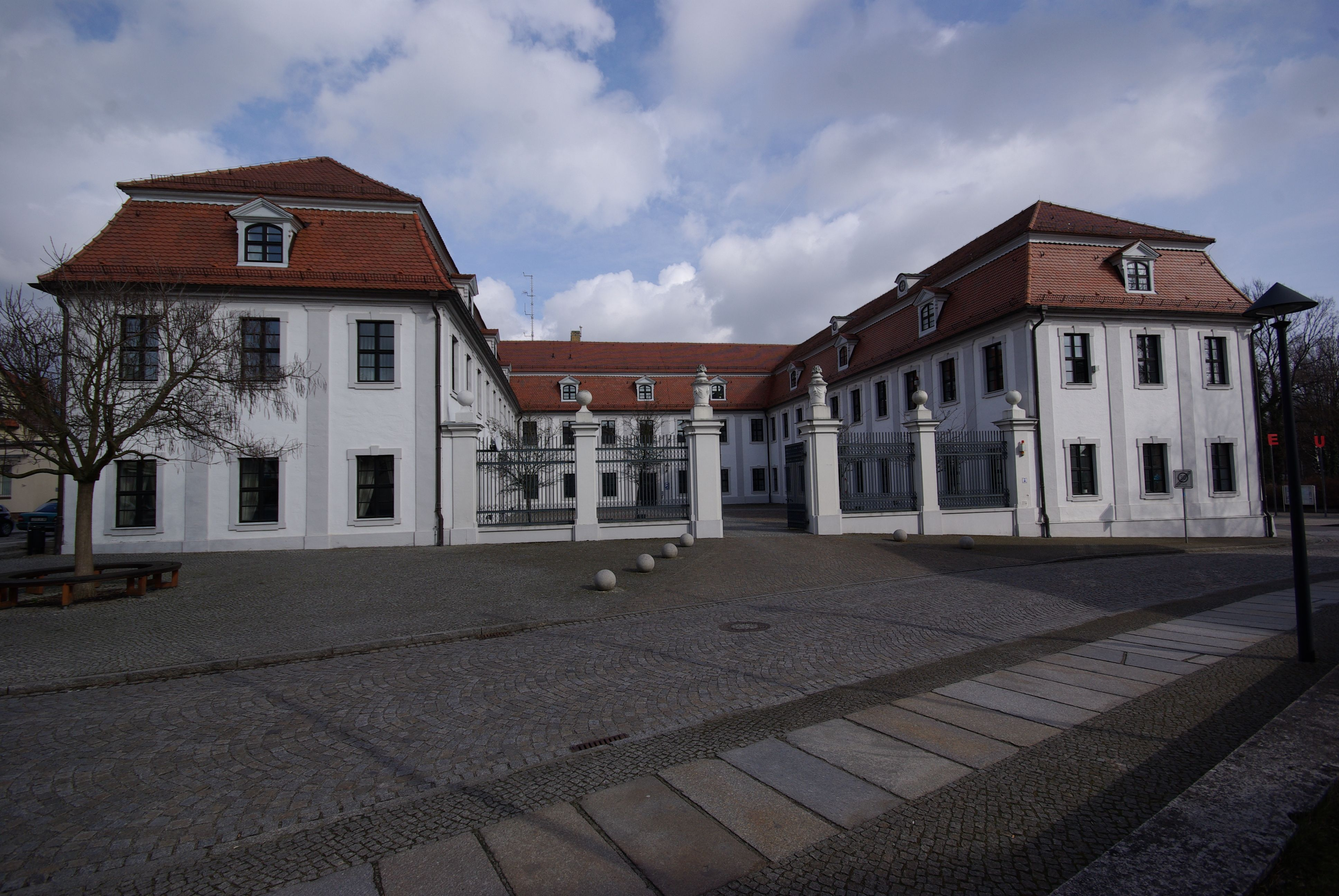 Denkmalgeschütztes Ständisches Landhaus in Lübben, Landkreis Dahme-Spreewald, Brandenburg, Deutschland. Es ist heute als Landratsamt Sitz der Verwaltung des Landkreises Dahme-Spreewald. Die Ansicht ist von der Gerichtstraße aus.